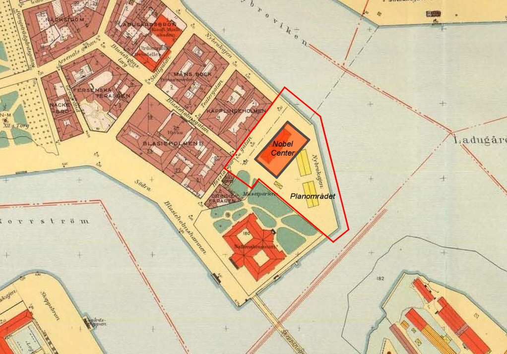 Del av 1940 års karta över Stockholm visande Blasieholmen med planerade Nobelcenter. Källa Stadsbyggnadskontoret.